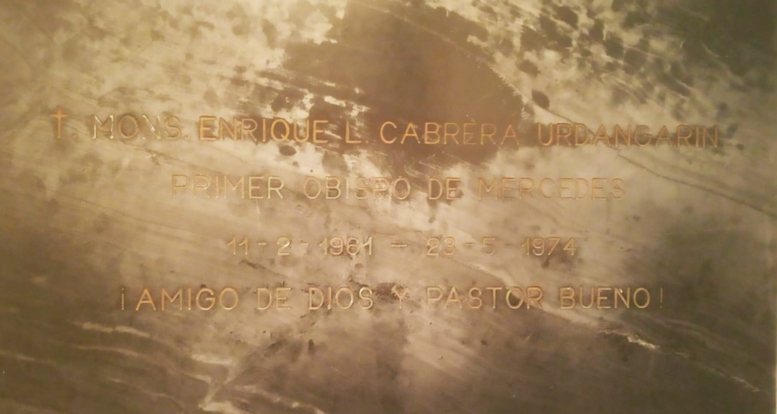 Se trata de la lápida que indica la presencia de los restos de quien fuera el primer Obispo de la Diócesis de Mercedes (Uruguay), Enrique Lorenzo Cabrera Urdangarín, 1900-1974.